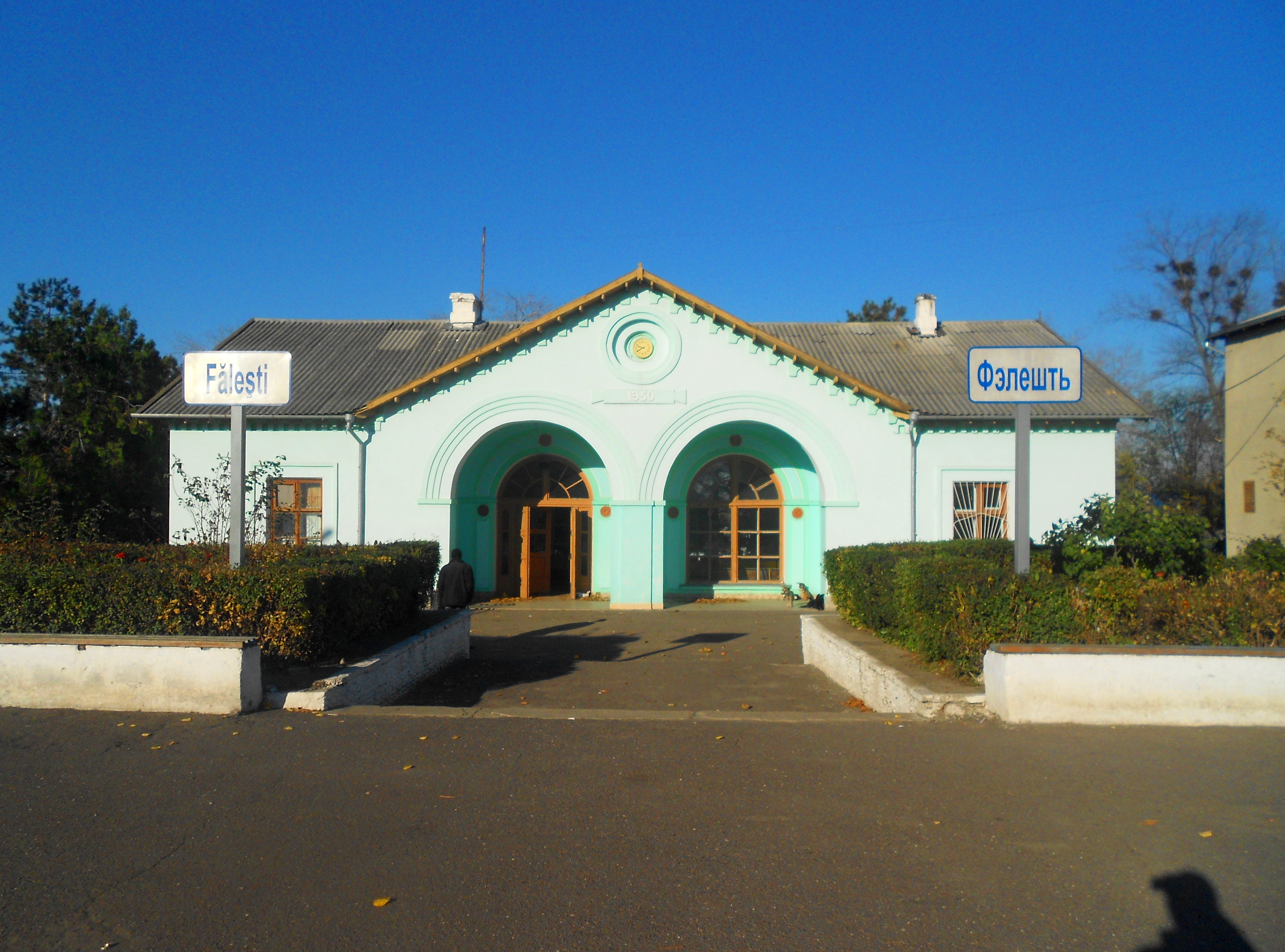 Gara feroviară Fălești